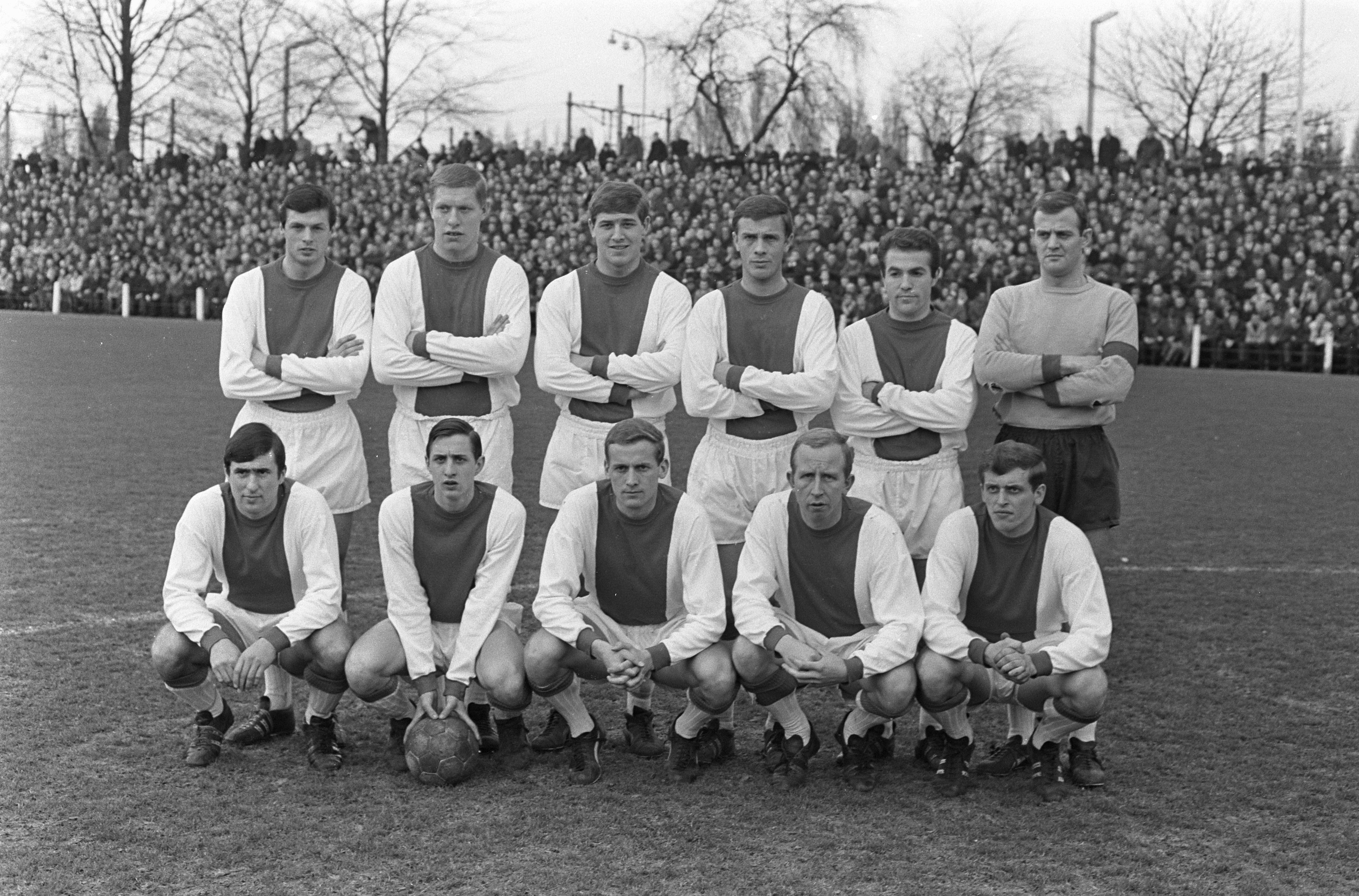 Collectie / Archief : Fotocollectie Anefo Reportage / Serie : [ onbekend ] Beschrijving : Elftal Ajax, boven v.l.n.r. Suurbier, Pronk, Duivenbode, Soetekouw, Muller, Bals, onder v.l.n.r. Swart, Cruijff, Nuninga, Groot, Keizer Datum : 26 februari 1967 Trefwoorden : sport, voetbal Persoonsnaam : Cruijff, Johan, Groot, Henk, Muller, Soetekouw, Frits, Swart, Sjaak Fotograaf : Nijs, Jac. de / Anefo Auteursrechthebbende : Nationaal Archief Materiaalsoort : Negatief (zwart/wit) Nummer archiefinventaris : bekijk toegang 2.24.01.05 Bestanddeelnummer : 920-1120